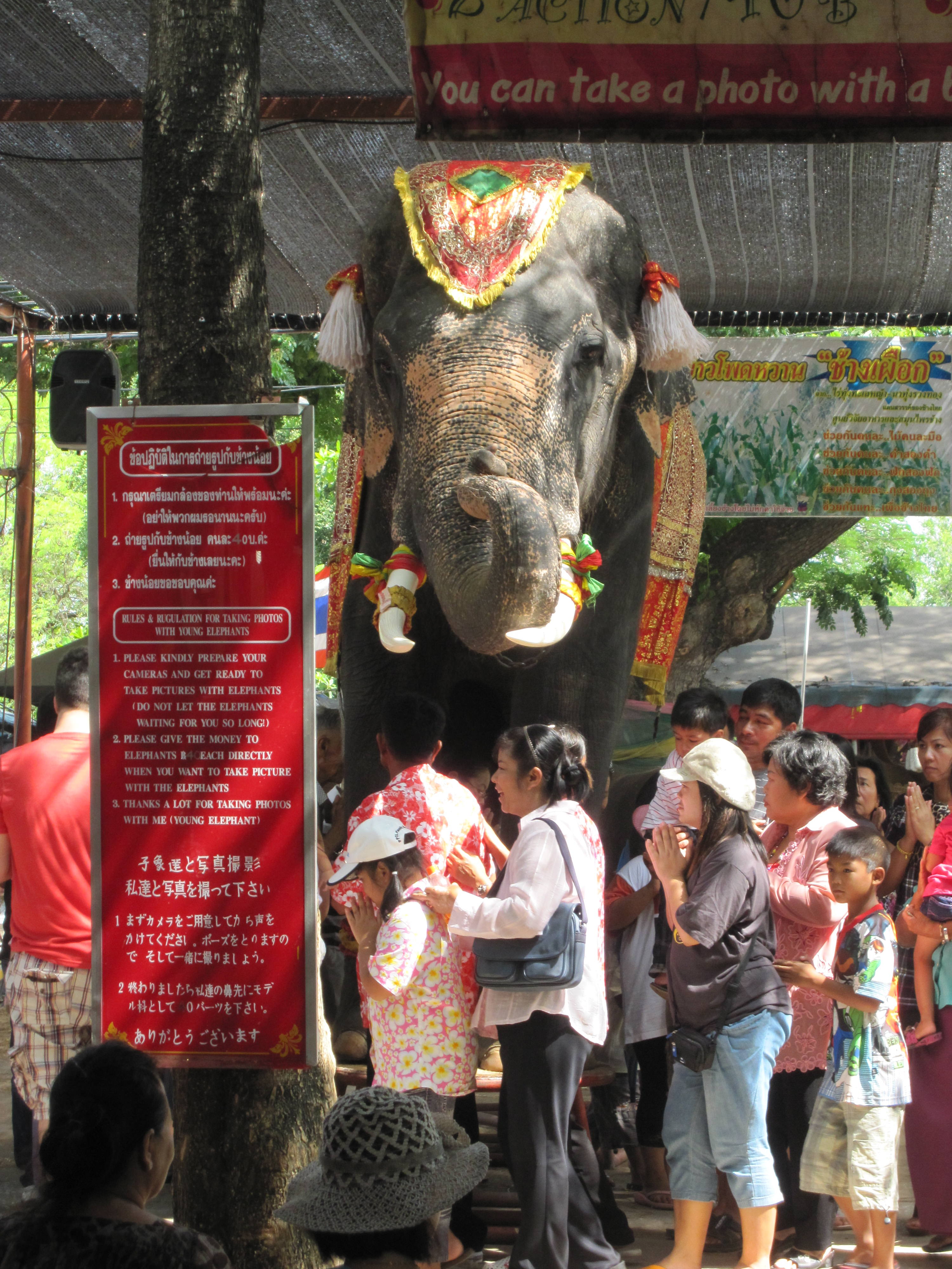 象乗り体験はアユタヤの名物である